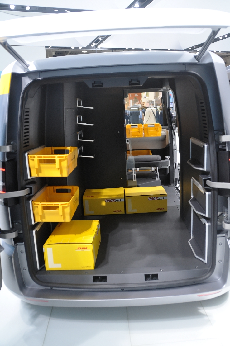 Hannover-Messe April 2012 Dieses Foto entstand durch die Mithilfe des gemeinnützigen Vereins Skillshare bei der Akkreditierung als Fotograf. Infos unter skillshare.eu Skillshare e.V. ist ein eingetragener gemeinnütziger Verein zur Förderung der Bildung durch Unterstützung der Erstellung, Sammlung und Verbreitung so genannten freien Wissens. IBAN: DE16 8306 5408 0004 8850 66 BIC: GENODEF1SLR Bank: VR-Bank Altenburger Land